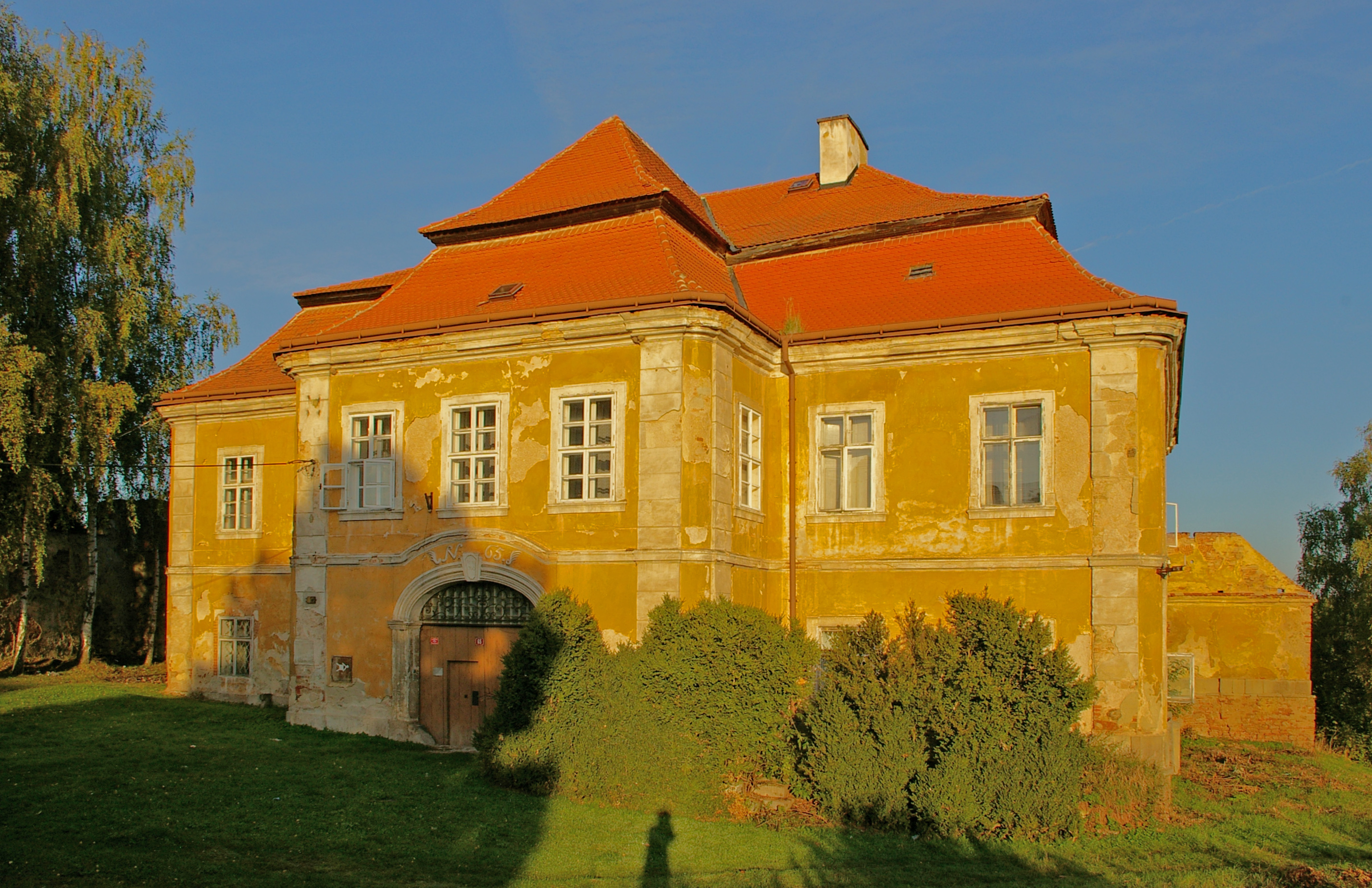 Fara (Jesenice), Plzeňská 65, Jesenice